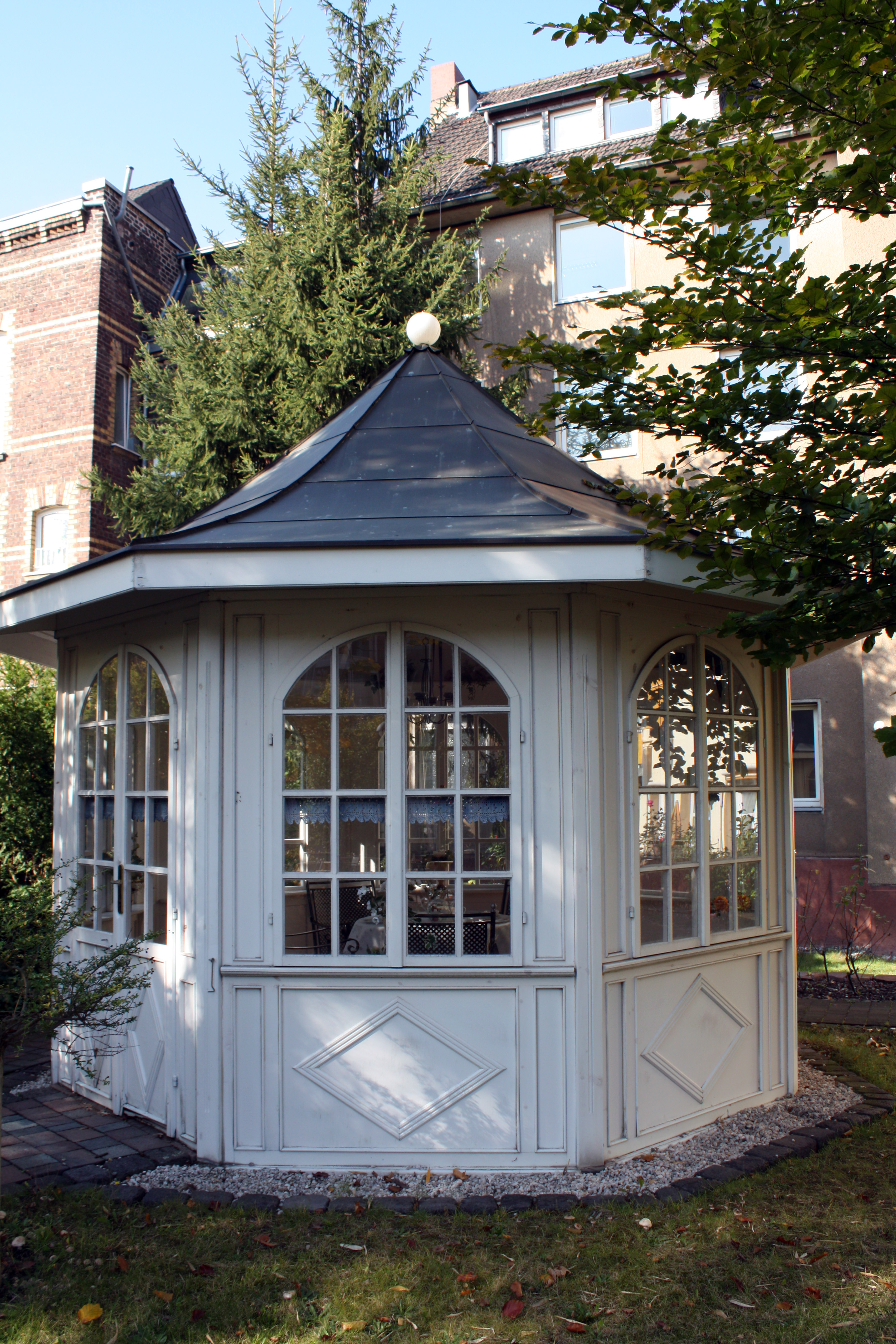 St. Anna-Haus, Köln-Lindenthal. Pavillon, Detail